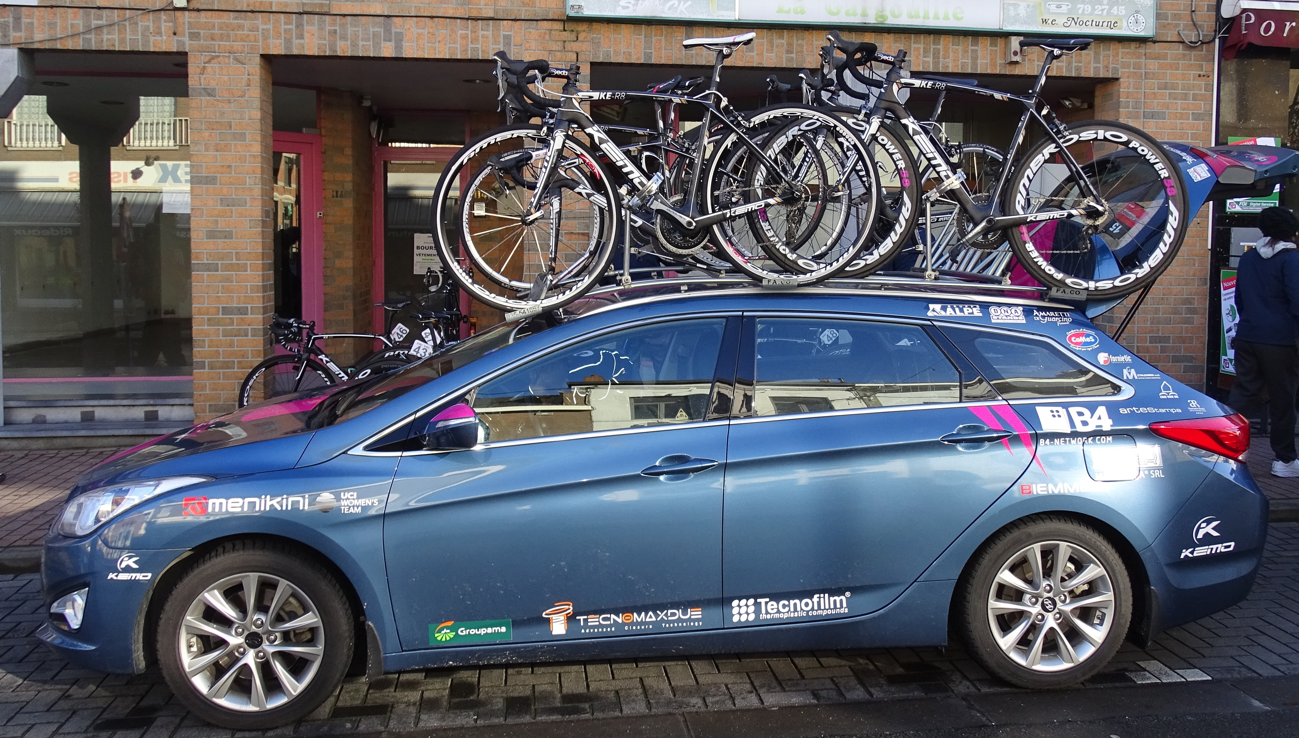 Reportage réalisé le mercredi 2 mars à l'occasion du départ du Samyn des Dames 2016 et du Samyn 2016 à Quaregnon, Belgique.